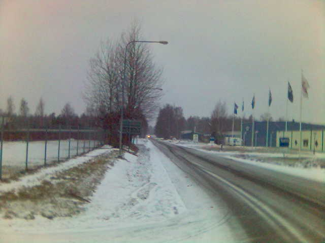 Foto: Lavas